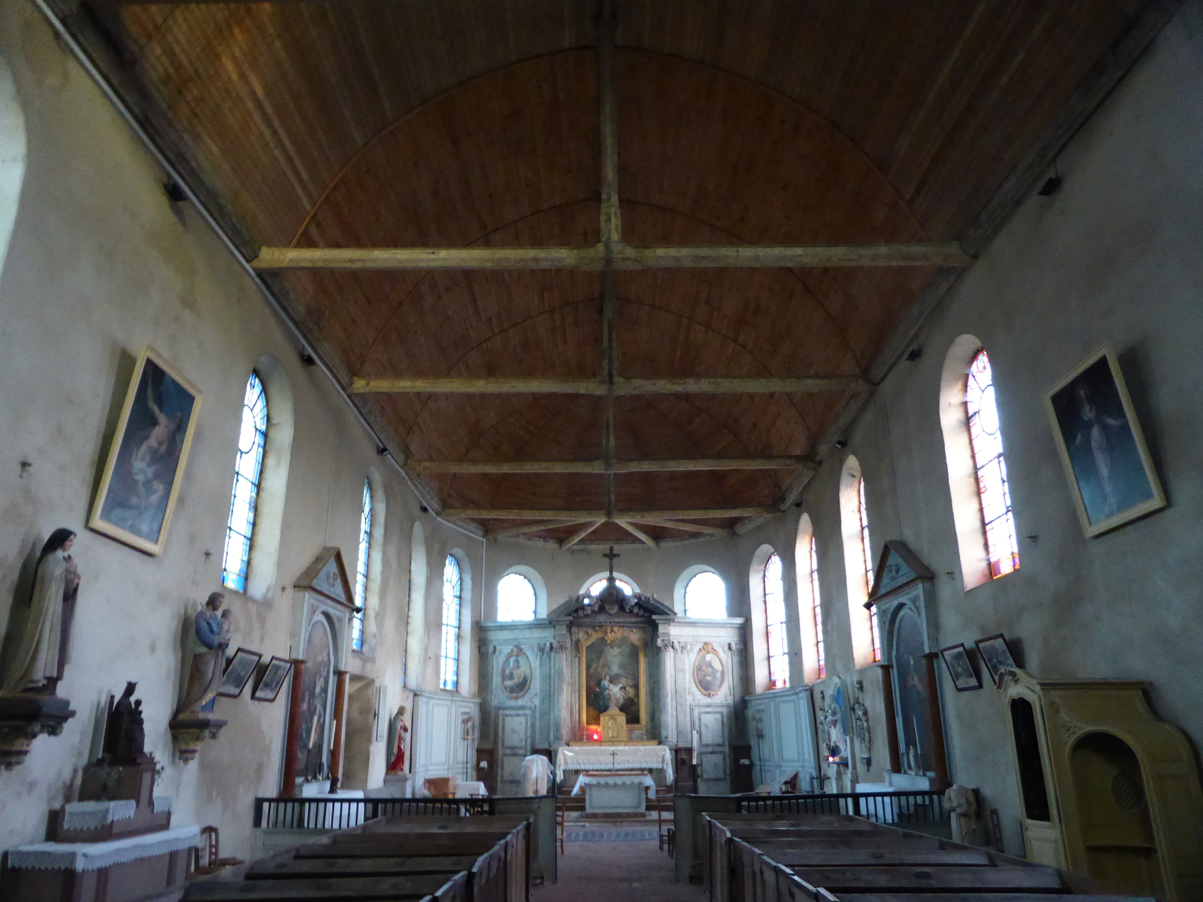 Nef de l'église Saint-Éloi-Saint-Jean-Baptiste de Crécy-Couvé, Eure-et-Loir (France).